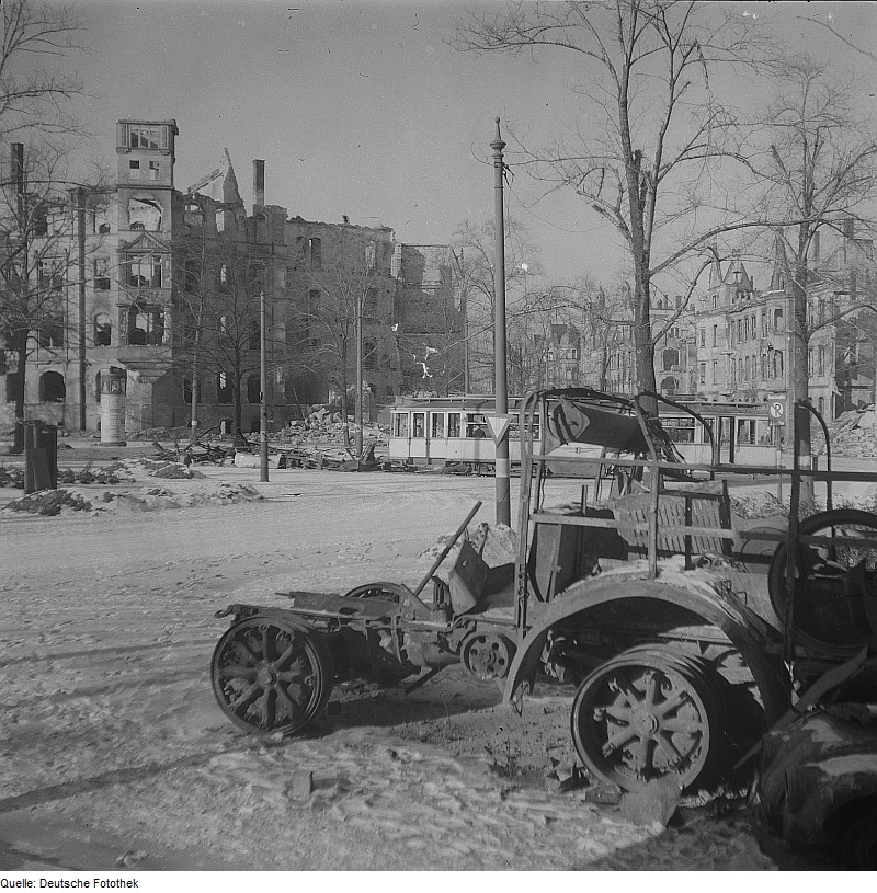 Original image description from the Deutsche Fotothek Ausgebranntes Kraftfahrzeug gegen Ruinen von Wohnhäusern. Im Mittelgrund Straßenbahntriebwagen (Großer "Hechtwagen") im Linienverkehr Dresden, Nürnberger Platz. Blick von der Hettnerstraße über den Nürnberger Platz zur Nürnberger Straße.